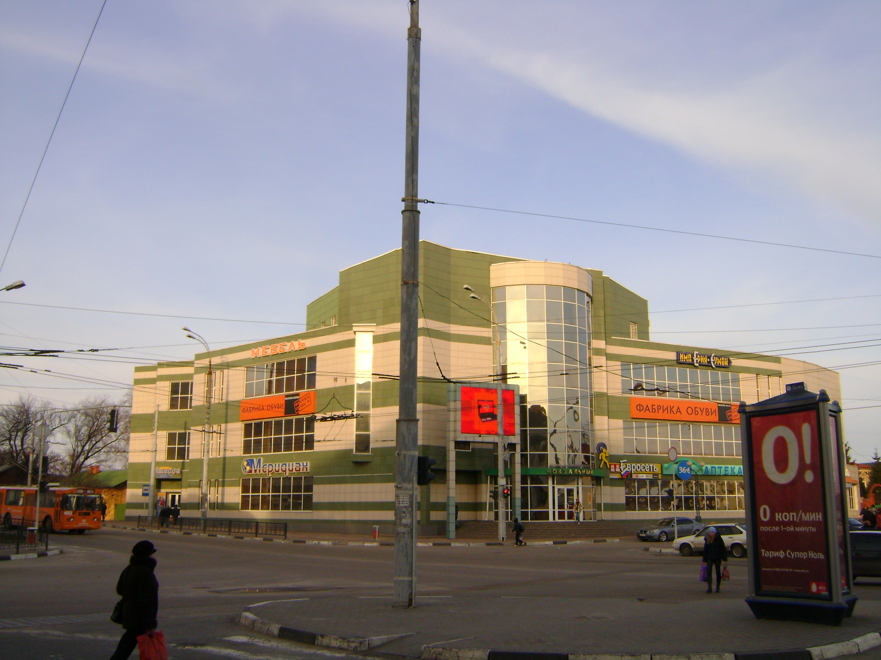 Здание торгово-офисного центра "Вокзальный"